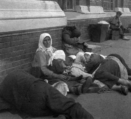 Під час Голодомору в Україні.